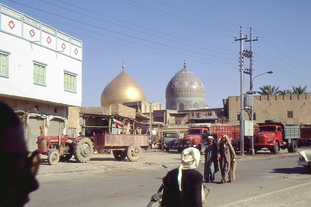 Les dômes de Samarra en 1970 (2)